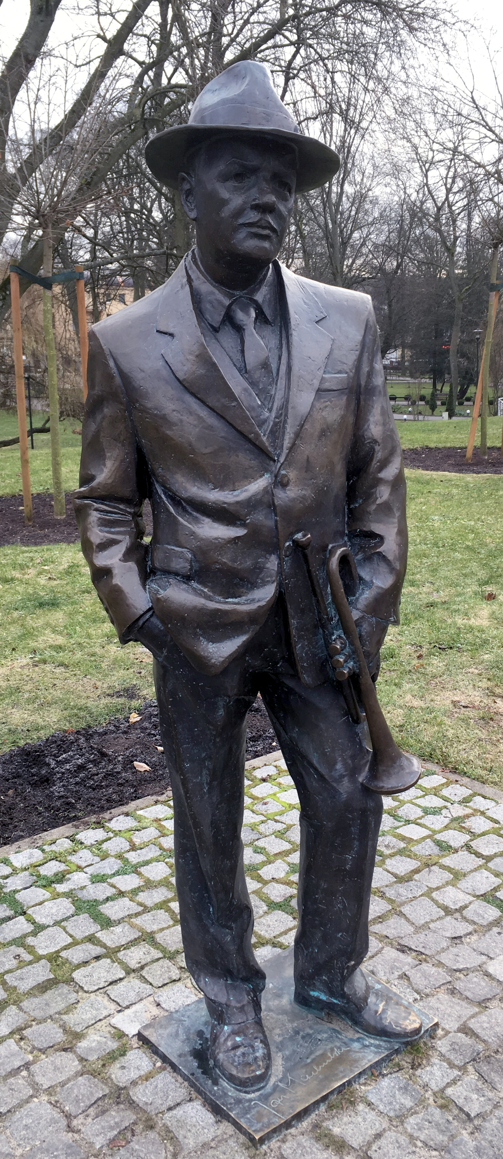 Denkmal für Jan Machulski in Misdroy (Polen)